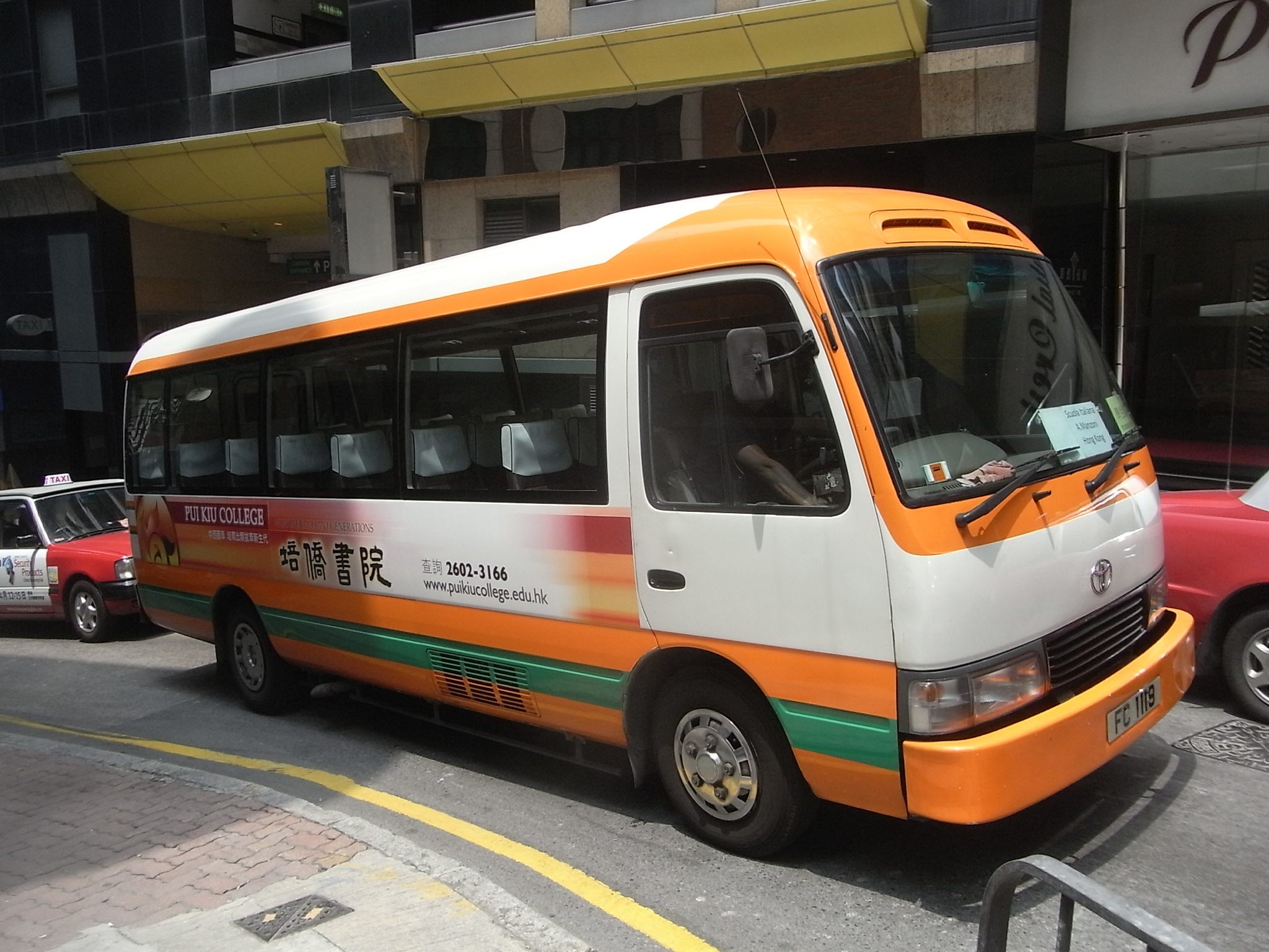 培僑書院